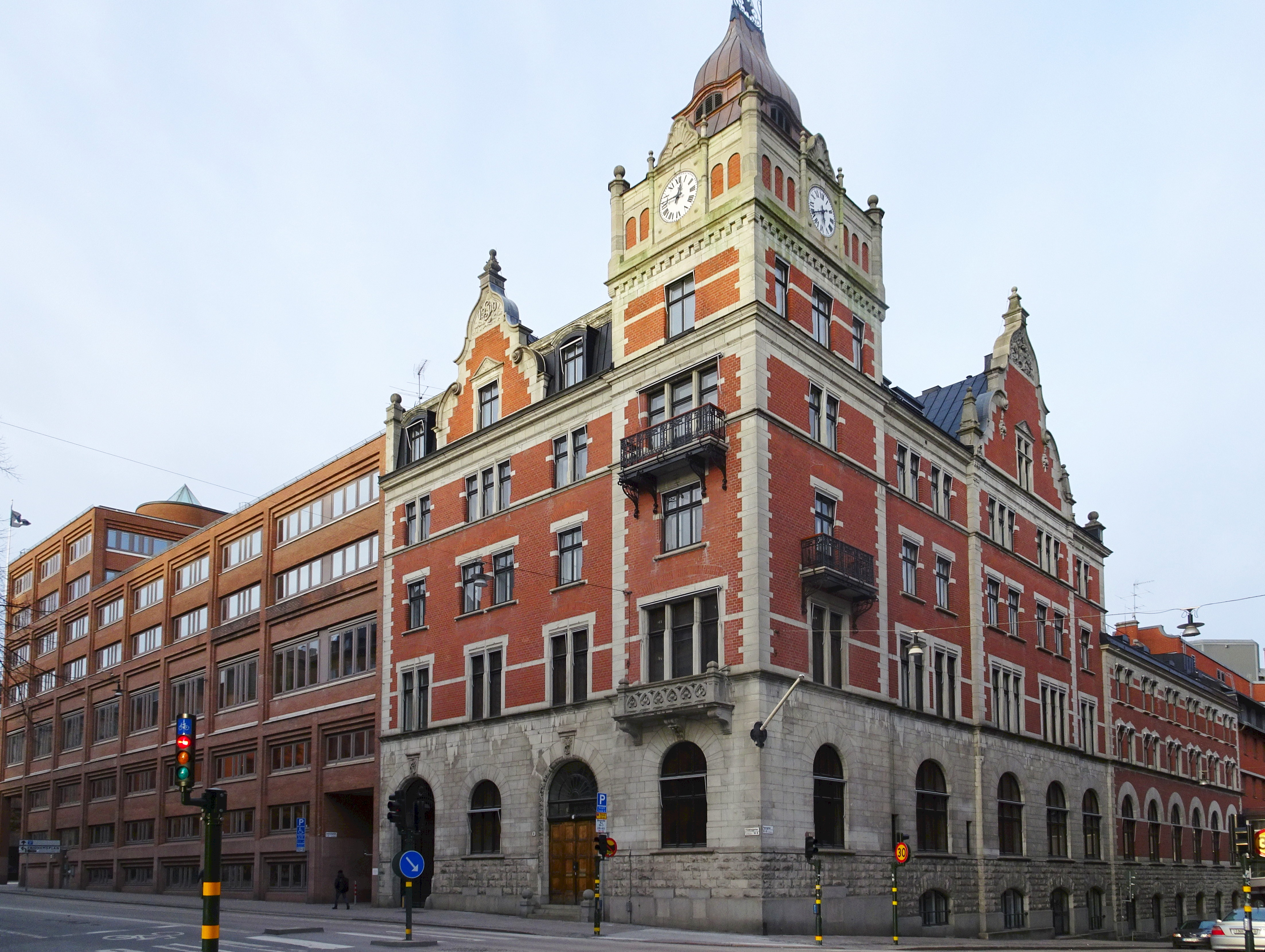 AB Separators kontorsbyggnad, fastigheten Klamparen 8, Fleminggatan 8